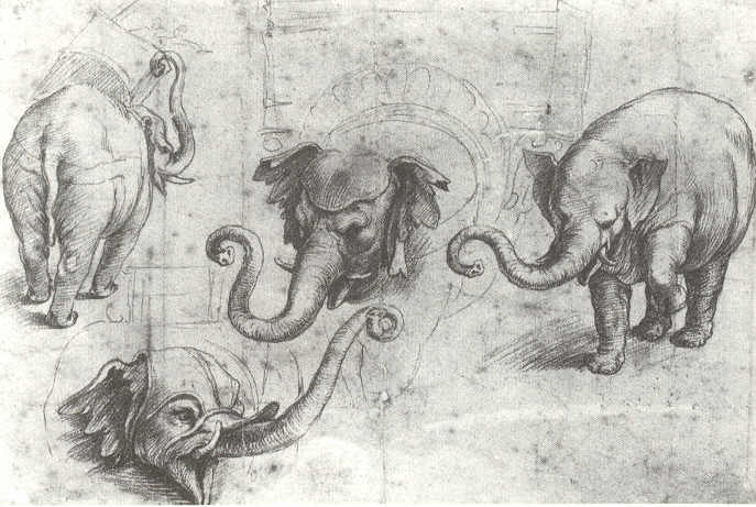 Vier Studien von Hanno (Kreide auf Papier)